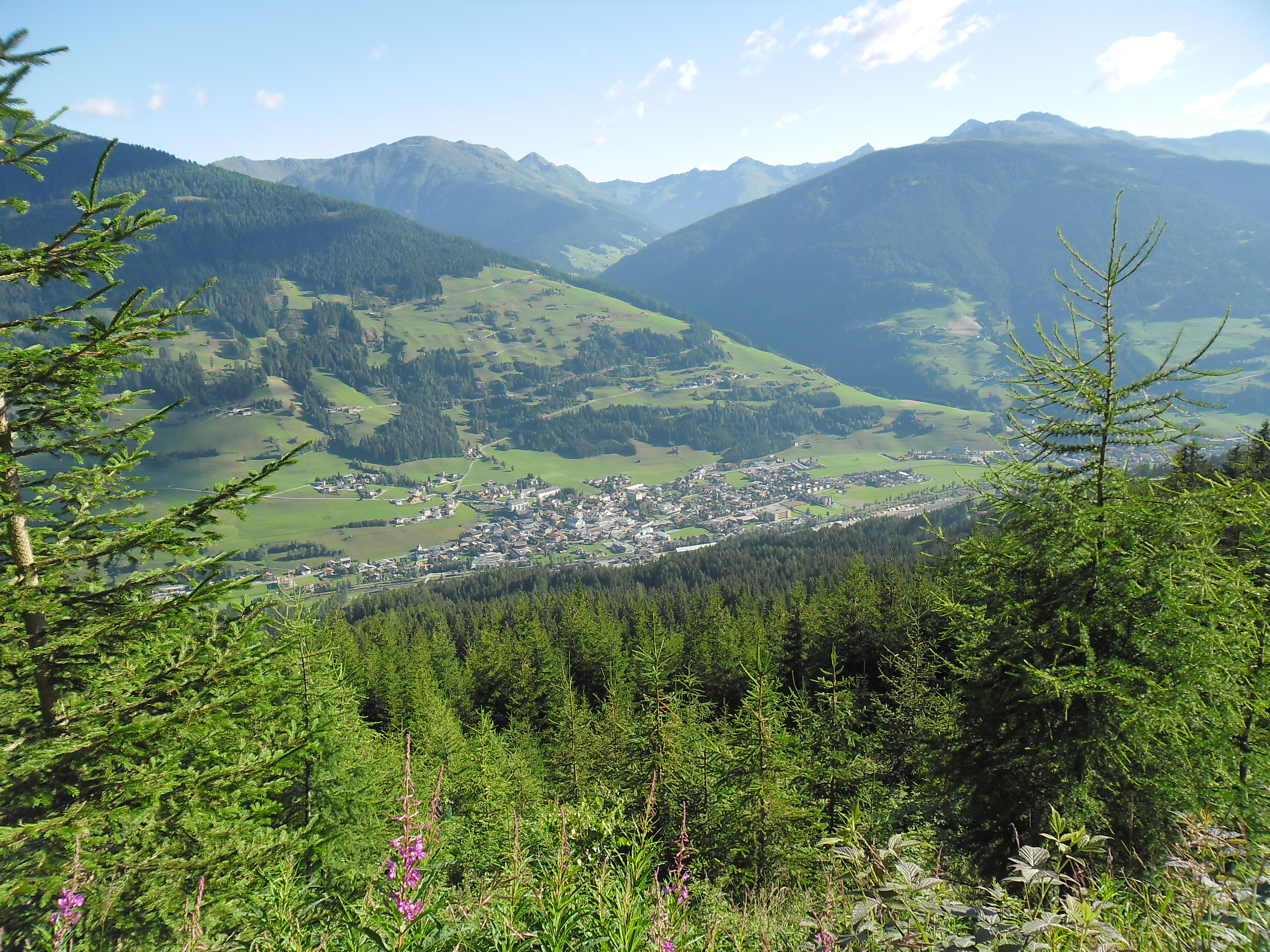 Blick auf Sillian in Richtung Sillianberg.